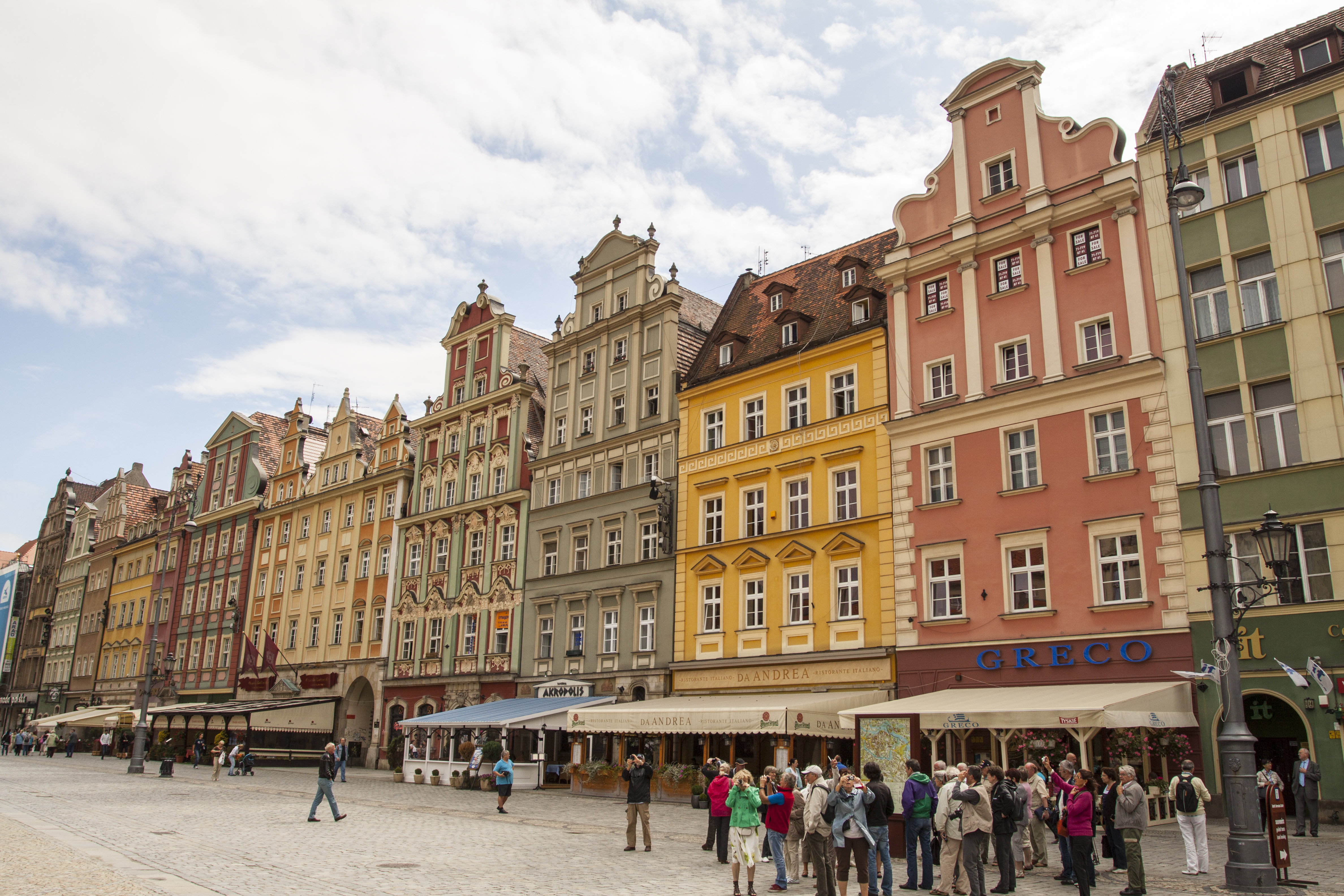 Kamienice na południowej stronie wrocławskiego rynku. Pierwsza od lewej to kamienica pod nr 15